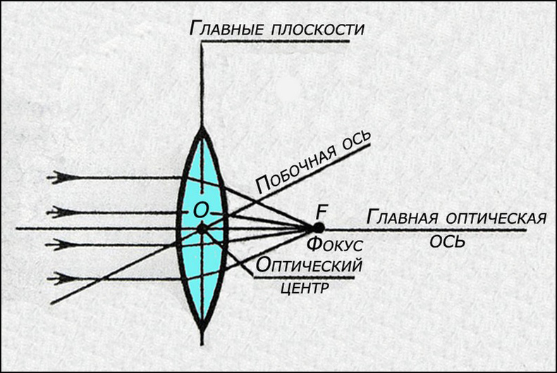 Схема Тонкая линза для Детской энциклопедии по теме Оптика